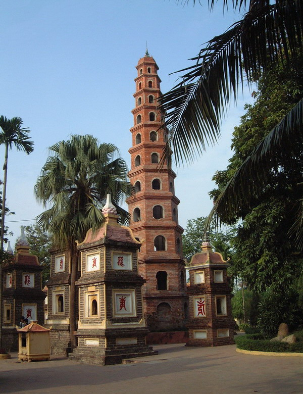 La pagode Tran Quoc (pagode de la Défense du Pays)